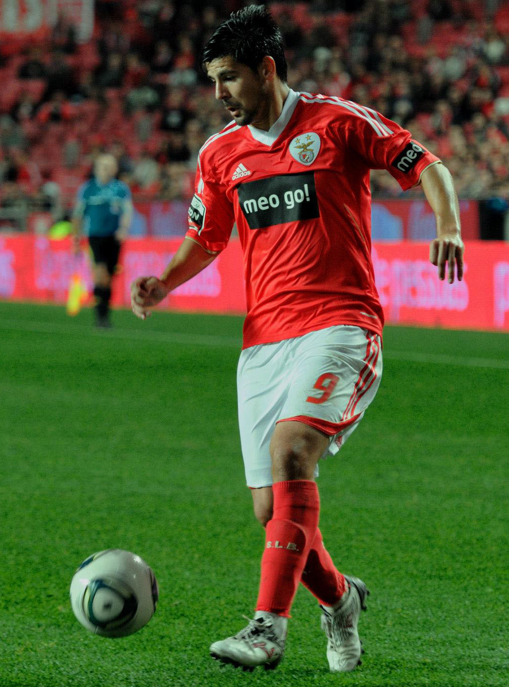 Nolito